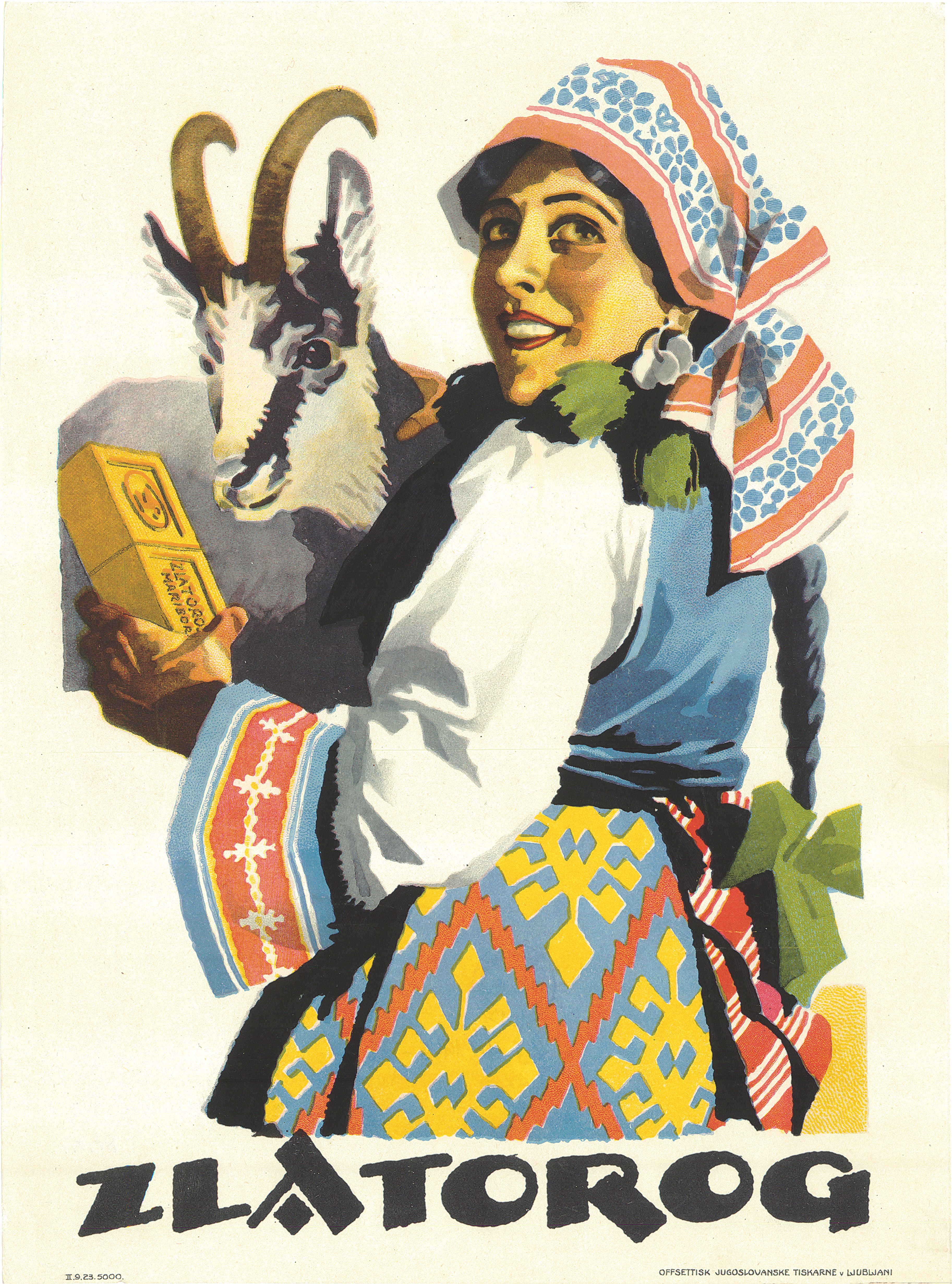 Plakat za Zlatorog